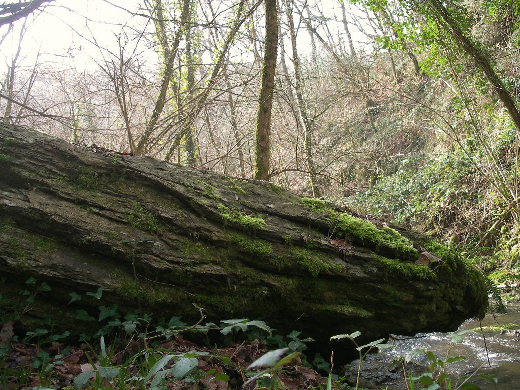 Menhir renversé dit la belle Roche à Culey-le-Patry Calvados (Basse-Normandie, France).